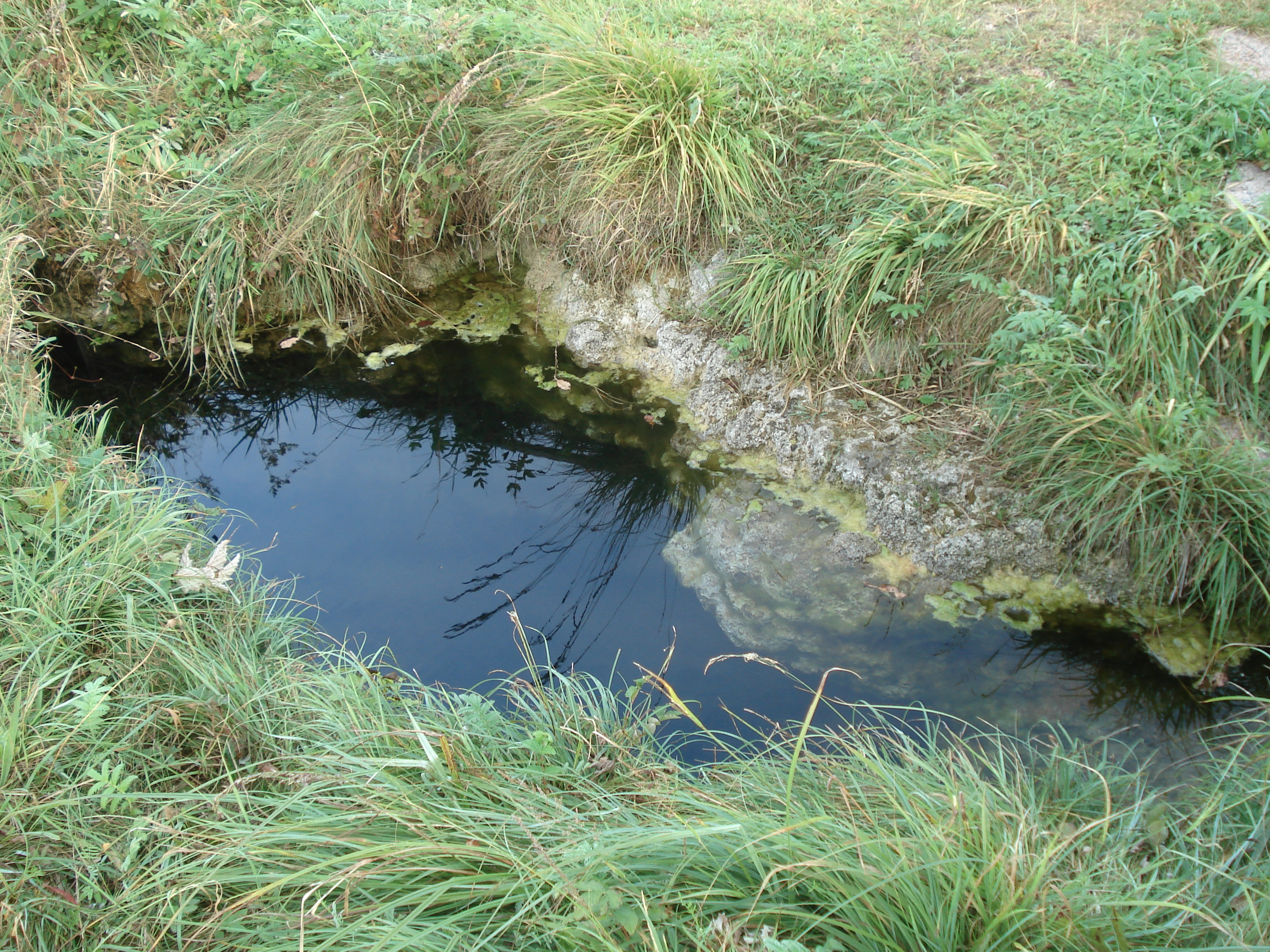 Das Gründleinsloch bei Pusselheim